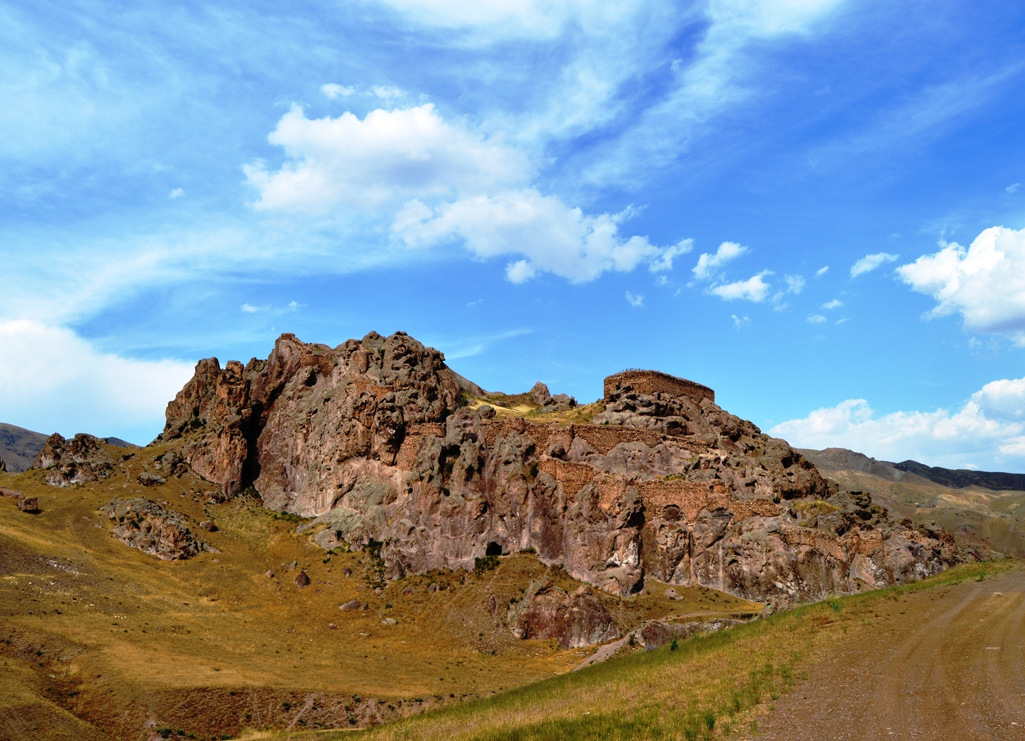 قلعه دختر میانه ــ عکاس: مجتبی اطهری